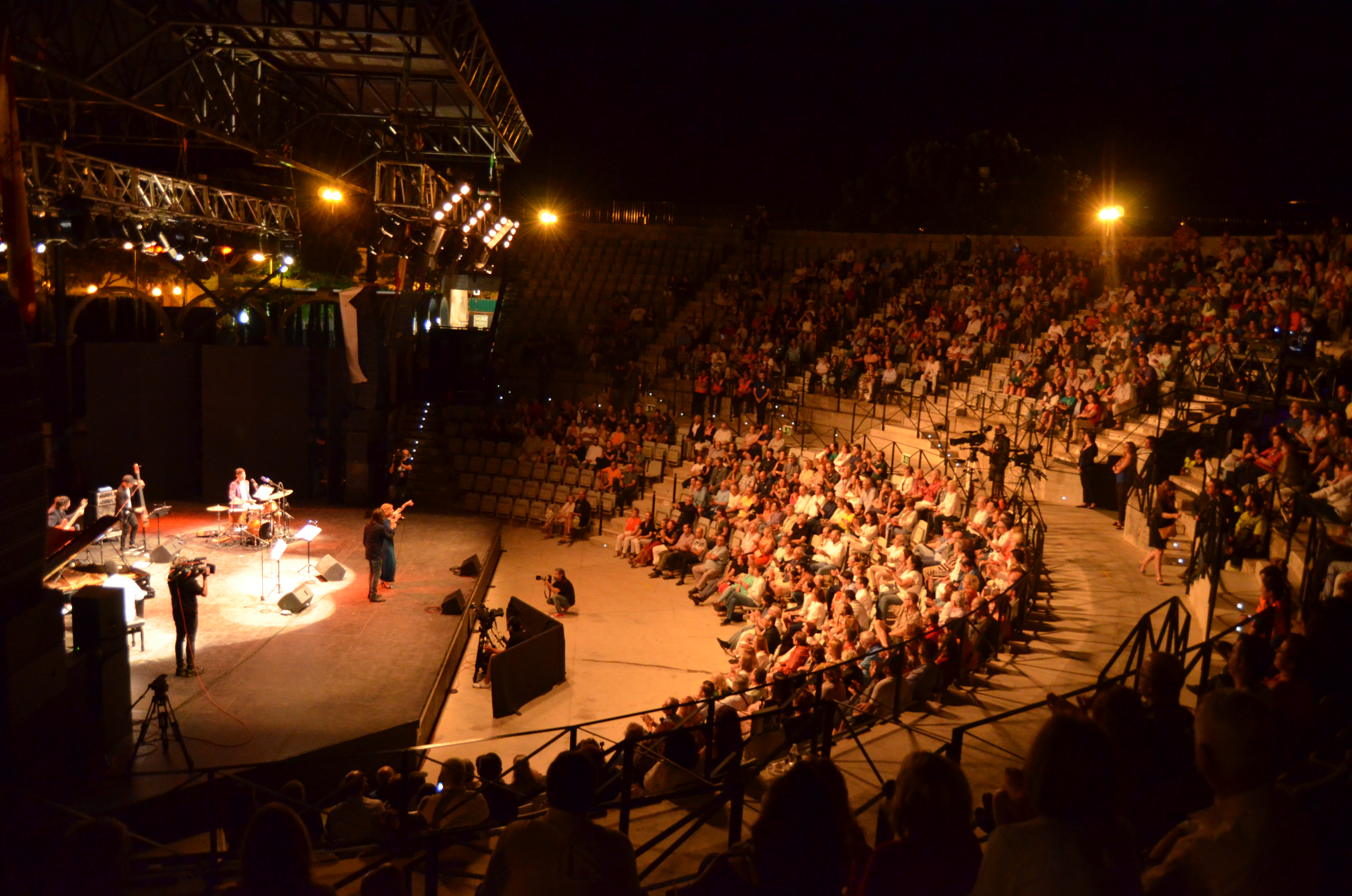 Concierto de apertura del Festival Internacional de Jazz de San Javier, 30 de junio de 2017. Concierto de Sole Giménez